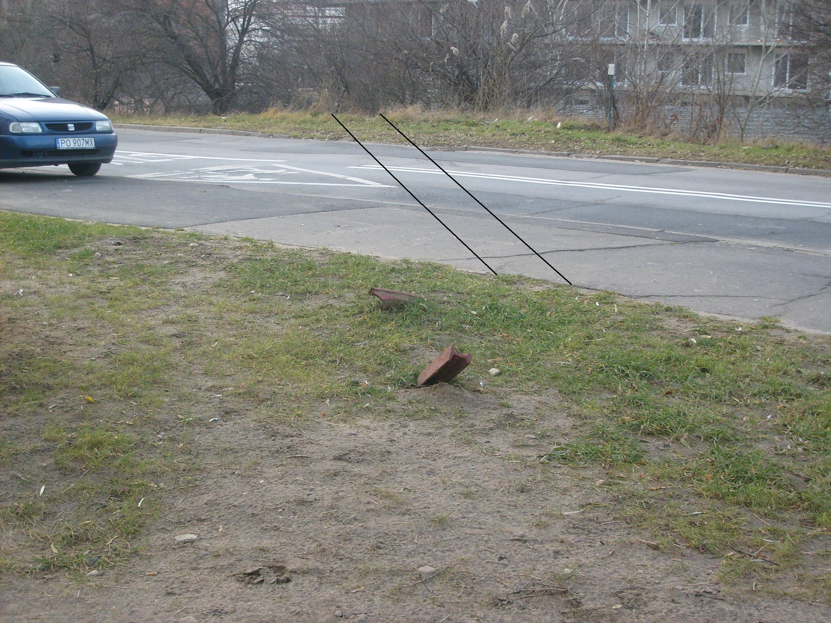 ulica Inflancka przy bloku osiedle Lecha 15-20 (strona północna). Tory kolejki wąskotorowej zatopione w asfalcie, przecinają ulicę, kończą się na skarpie z jednej strony, z drugiej strony wychodzą na powierzchnię (widoczne na zdjęciu). Wykorzystywane podczas budowy w latach 70. XX wieku do transportu wielkiej płyty z Wytwórni